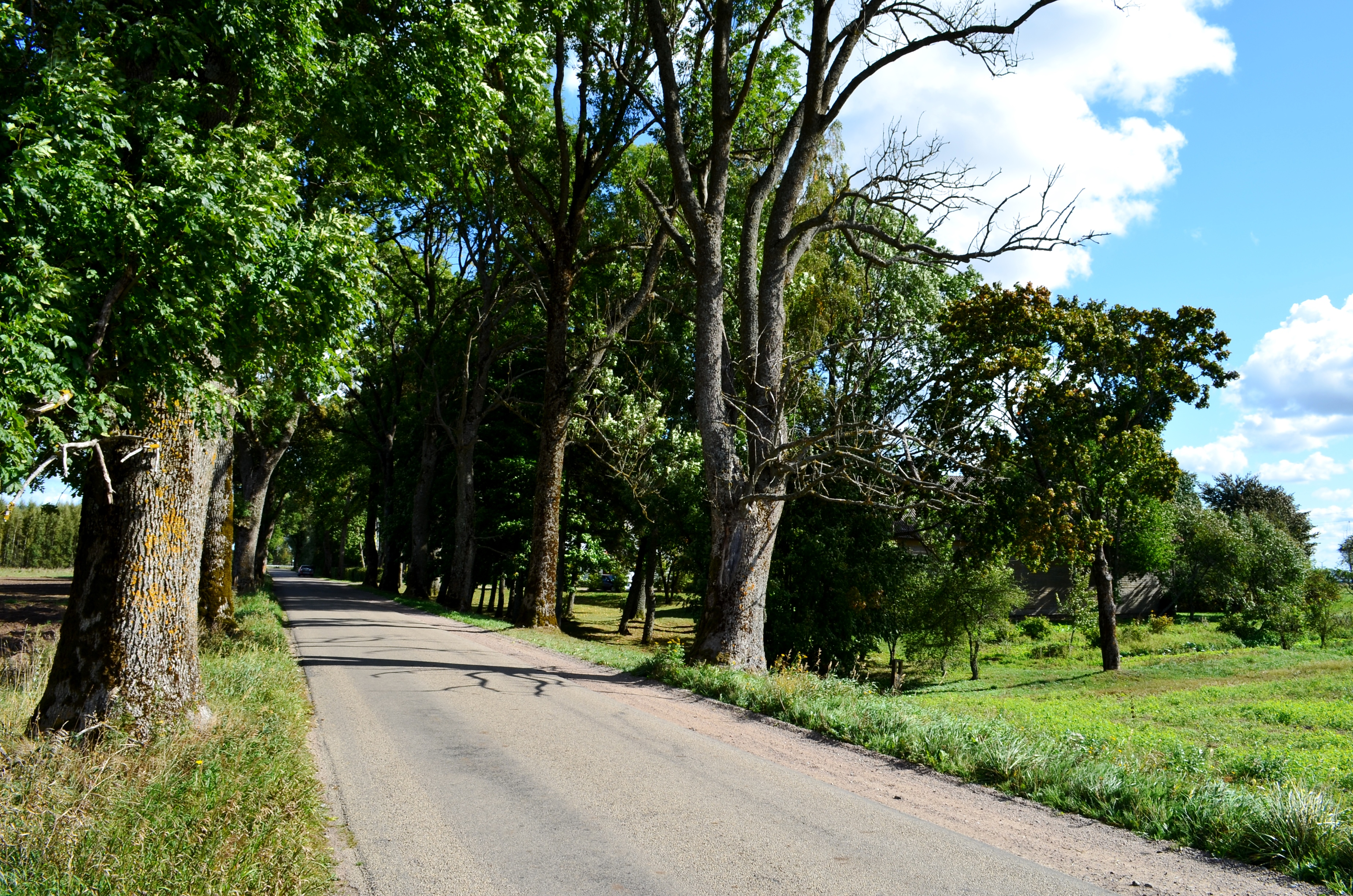 Žemaitėška: Kloguonā, klevū aliejė, Šėlotės rajuons